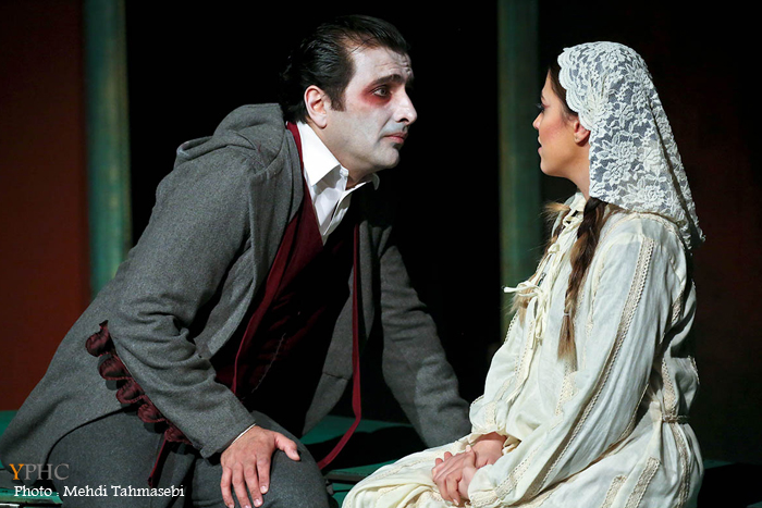 شیدا خلیق در نمایش «مرثیه‌ای برای یک دراکولا»